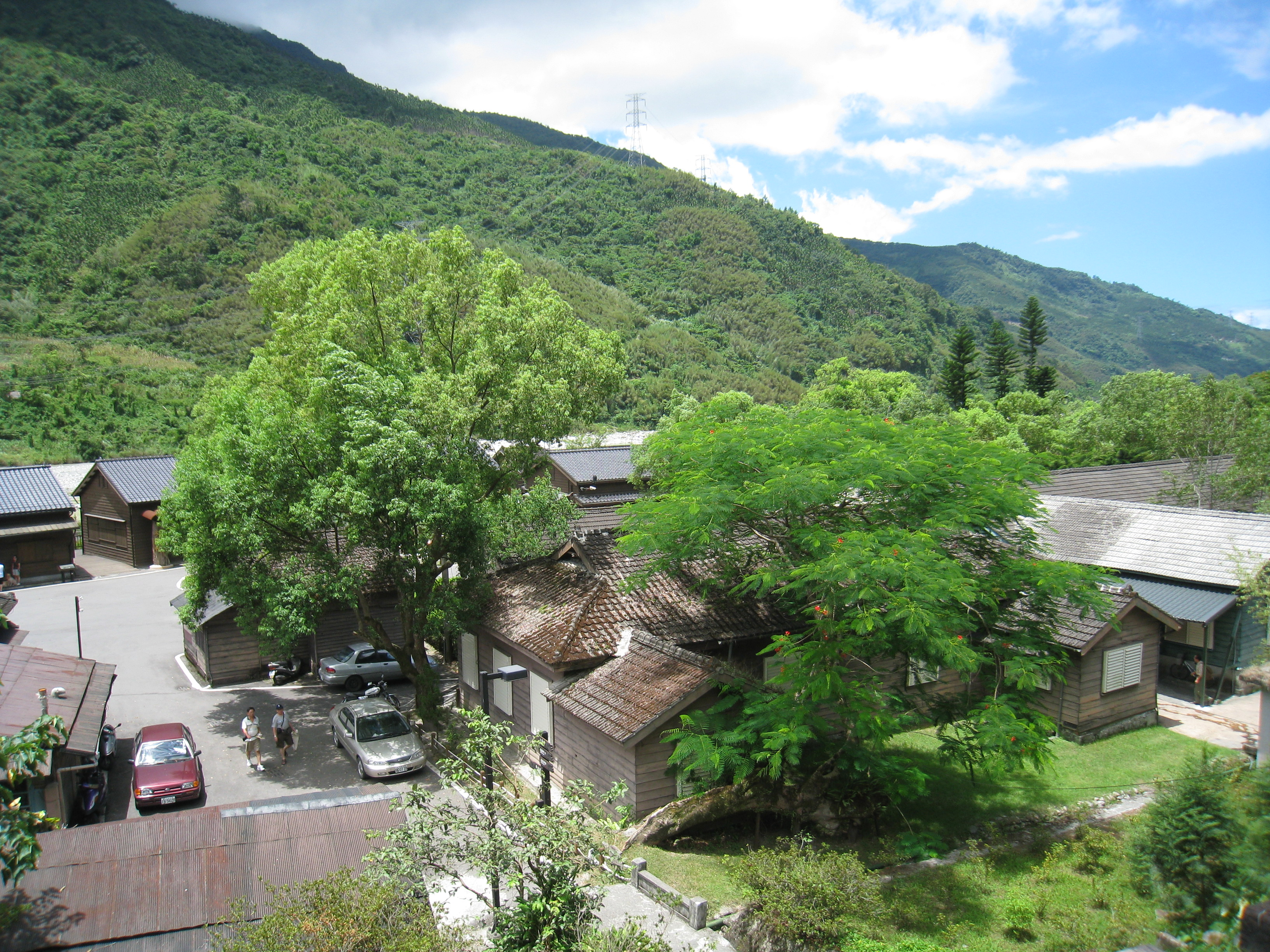 花蓮林田山林業文化園區。